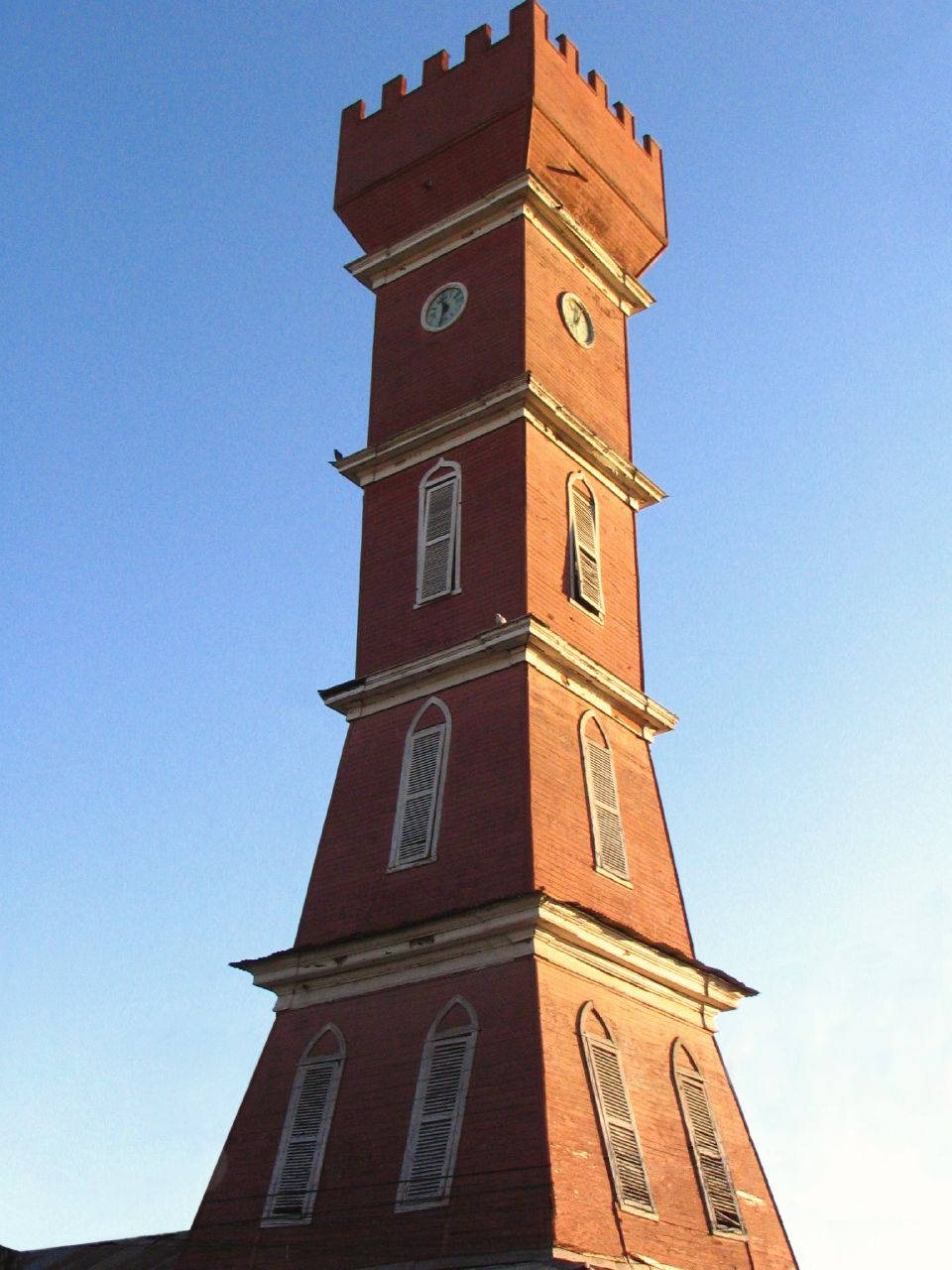 Torre Bauer de Vicuña, Chile.